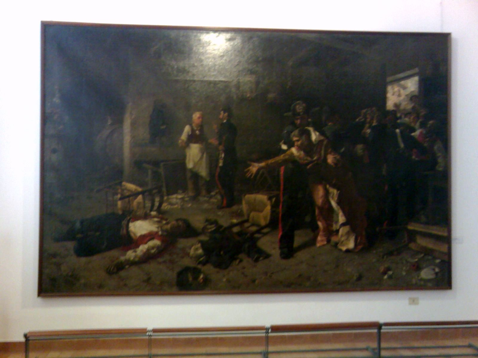 Accademia di Belle Arti di Napoli - La galleria dell'accademia, Michele Cammarano Partita a briscola 1886